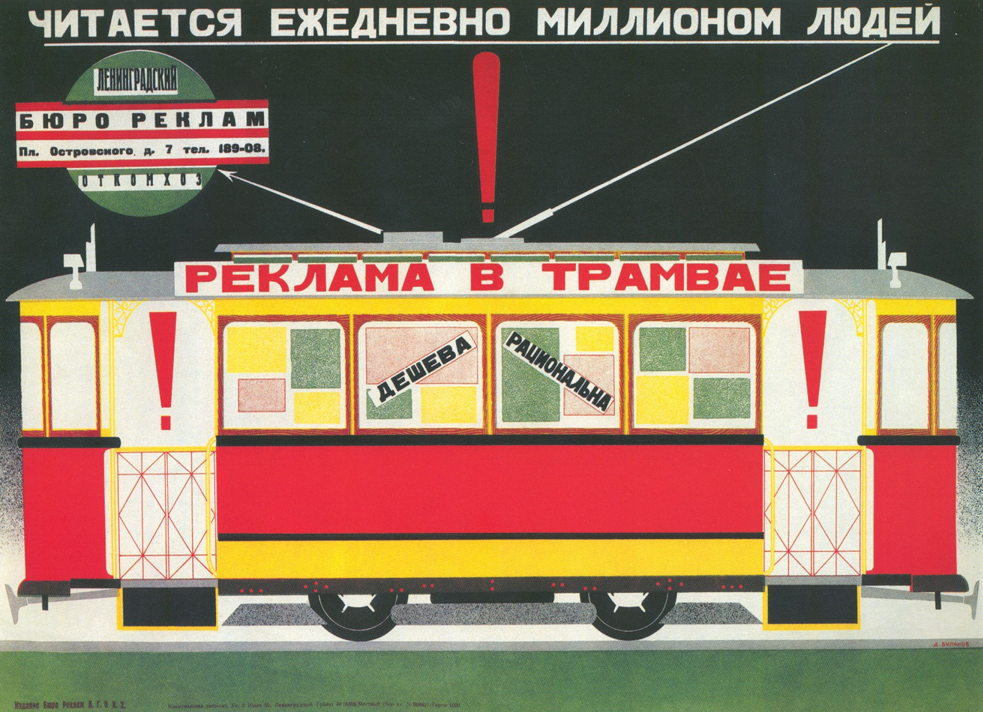 Плакат «Реклама в трамвае дешева и рациональна. Читается ежедневно миллионом людей». Москва, 1927. Тираж 1000 экз.